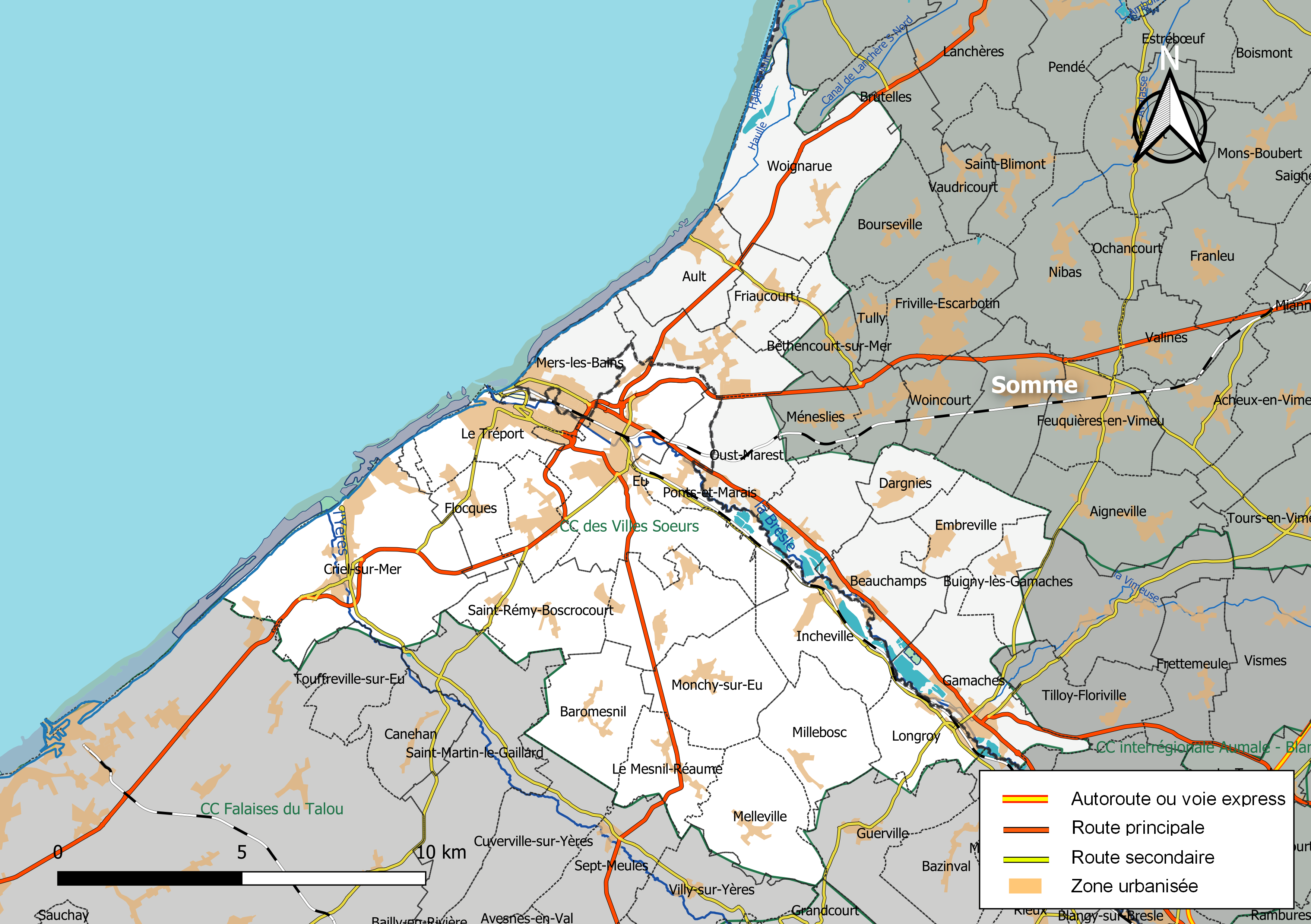 Carte géographique de la Communauté de communes des Villes Sœurs, département de la Seine-Maritime, France. Composition au 1er janvier 2019.